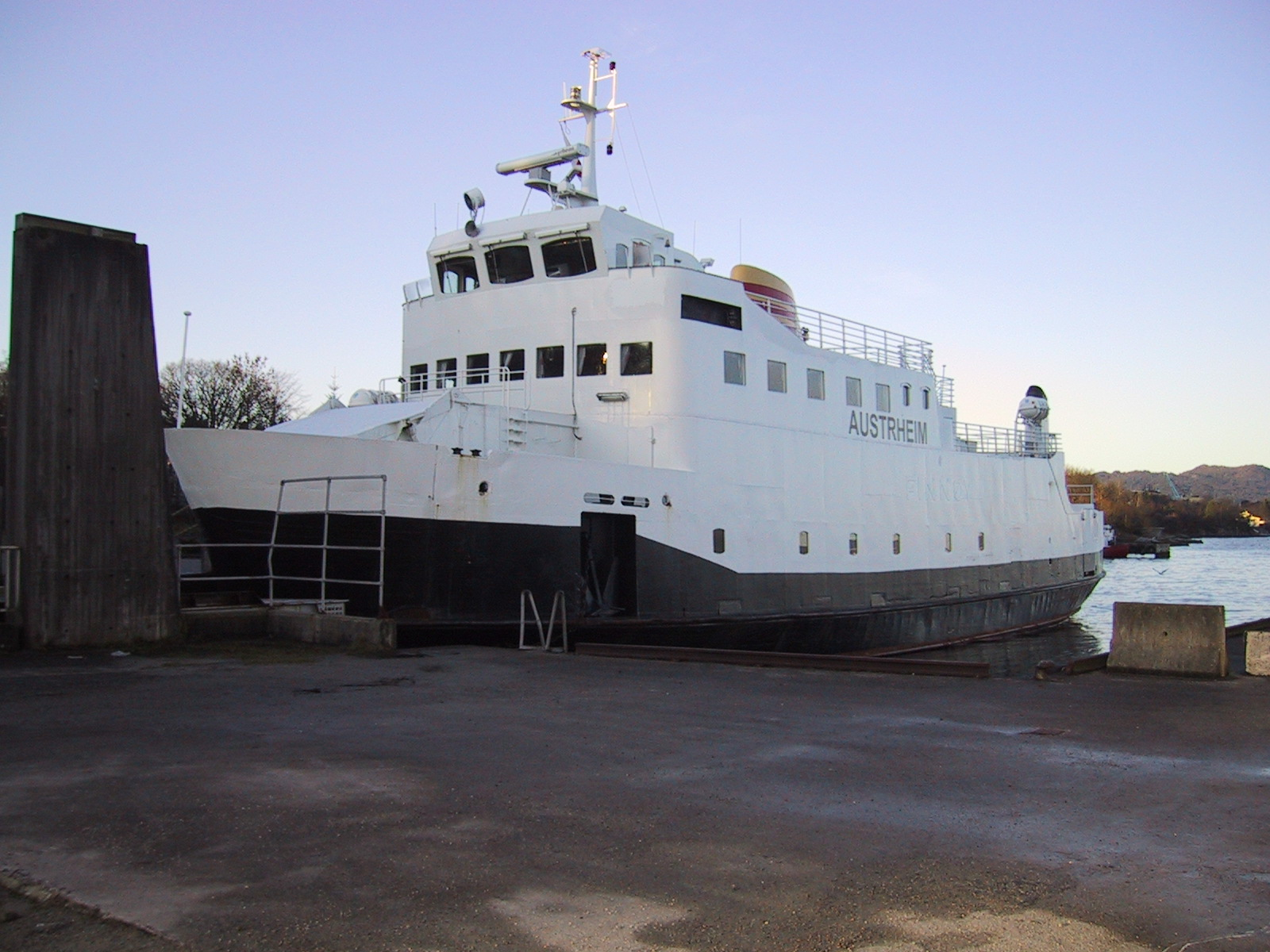 M/F Finnøy (1971).